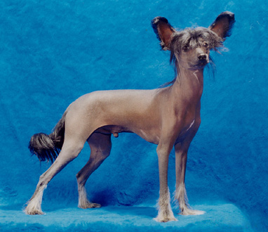 סיני מצויץ צילום: יגאל פרדו